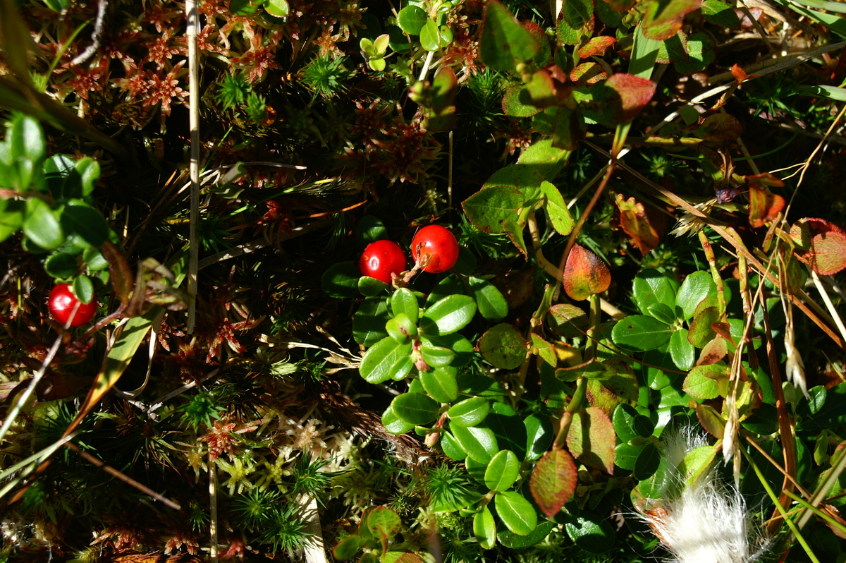 Brusnica na Rogli.